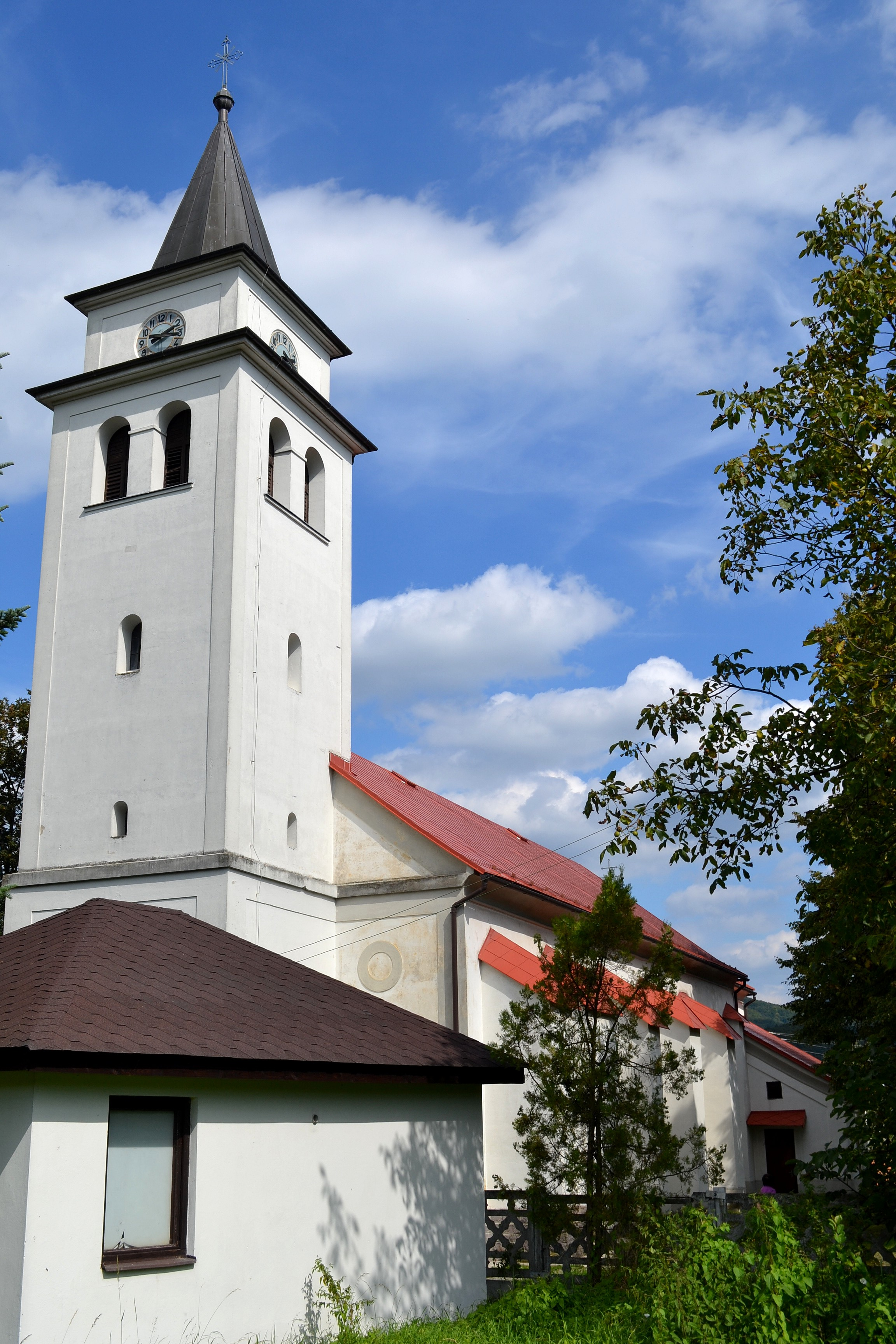 Kostol svätých Petra a Pavla v Žarnovici; detail